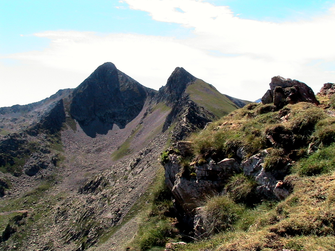 Tuc dera Lança i Escòrnacrabes des del cap de Vaqueira, a la Vall d'Aran This is a a photo of a natural area in Catalonia, Spain, with id: ES510084